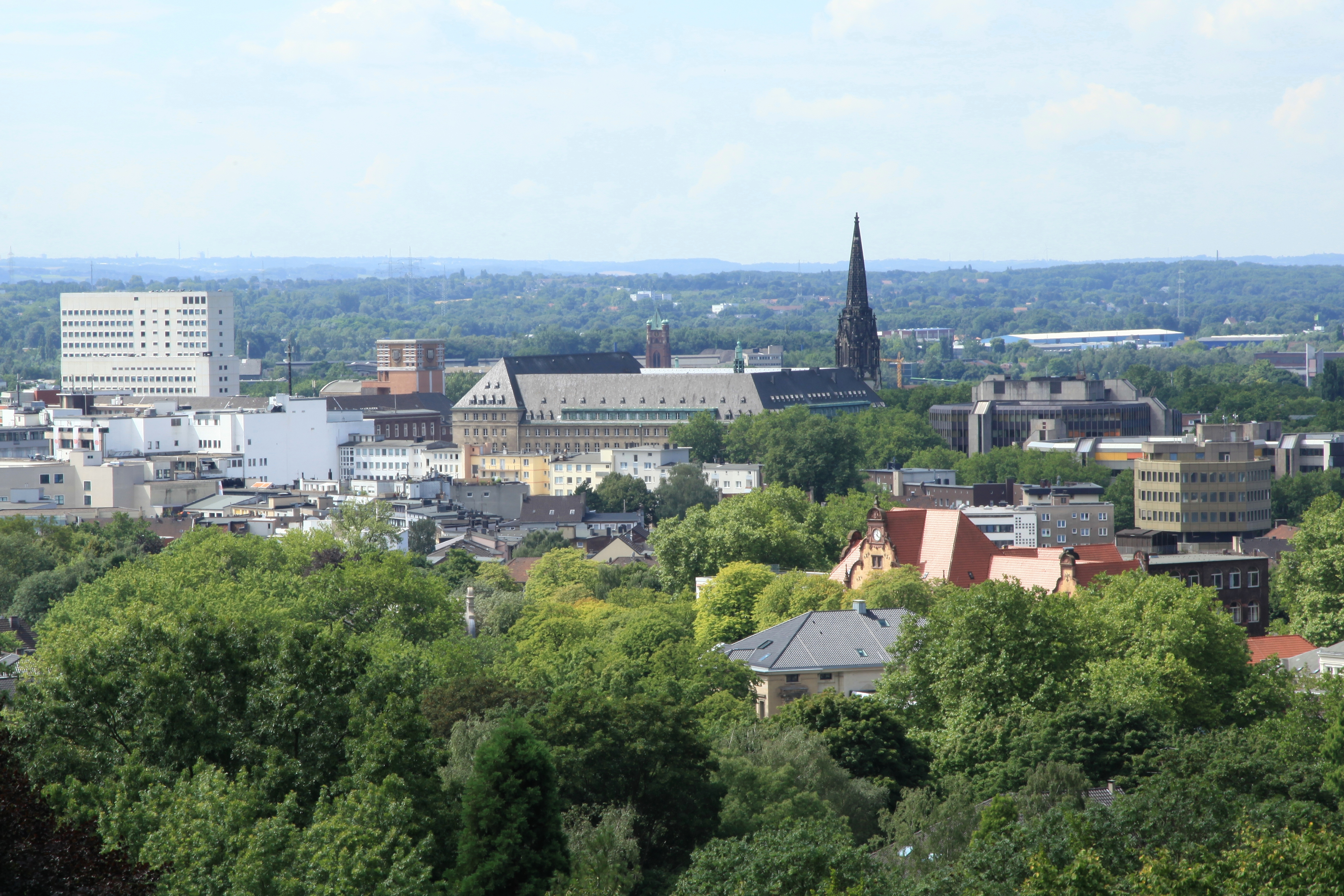 Blick vom Bismarckturm auf Rathaus und Christuskirche in Bochum